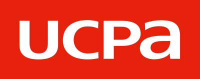 Nouvelle version du logo UCPA - Charte graphique 2015 Retrait du logo à bandes en 2014